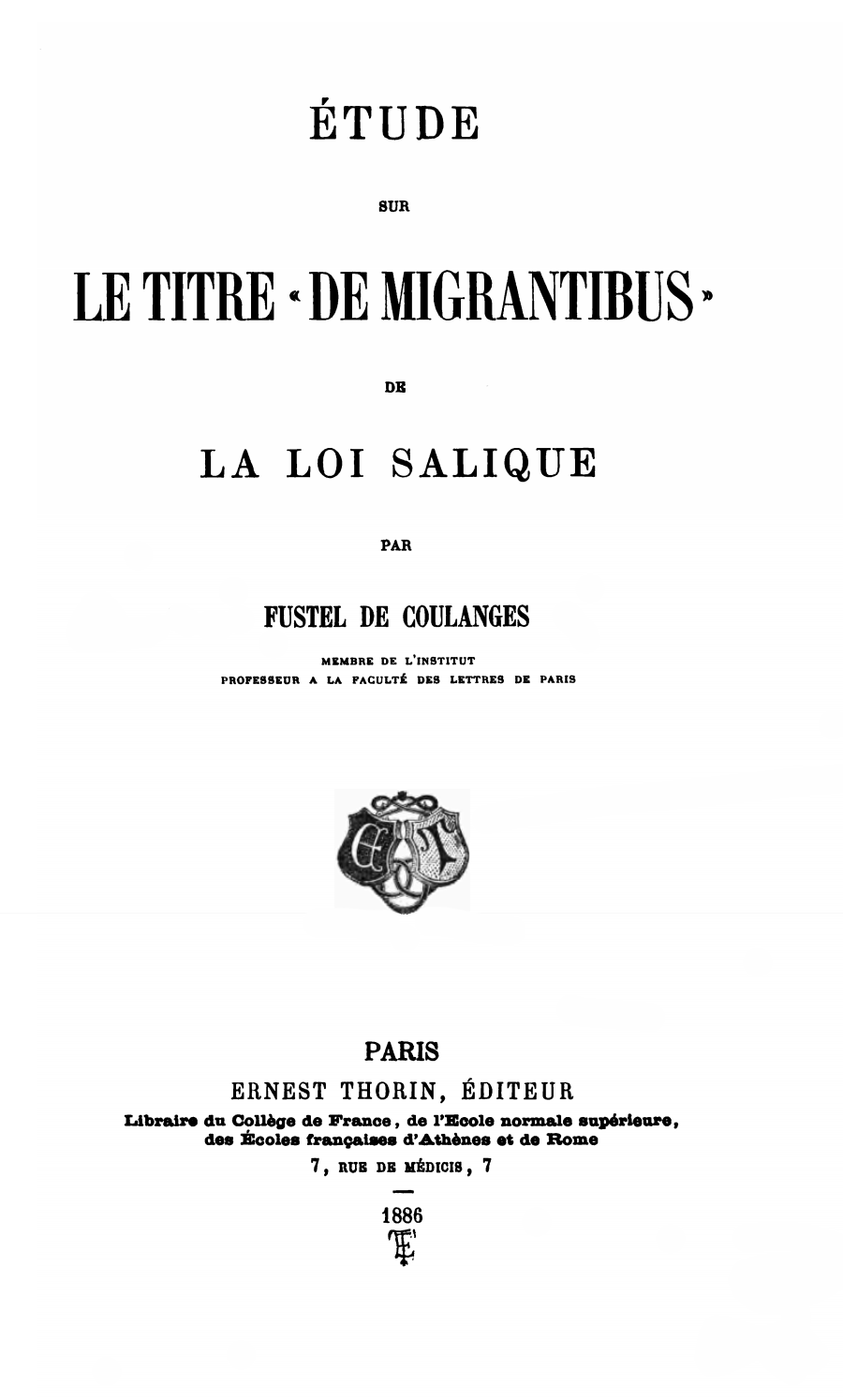 Étude sur le titre «De migrantibus» de la Loi Salique